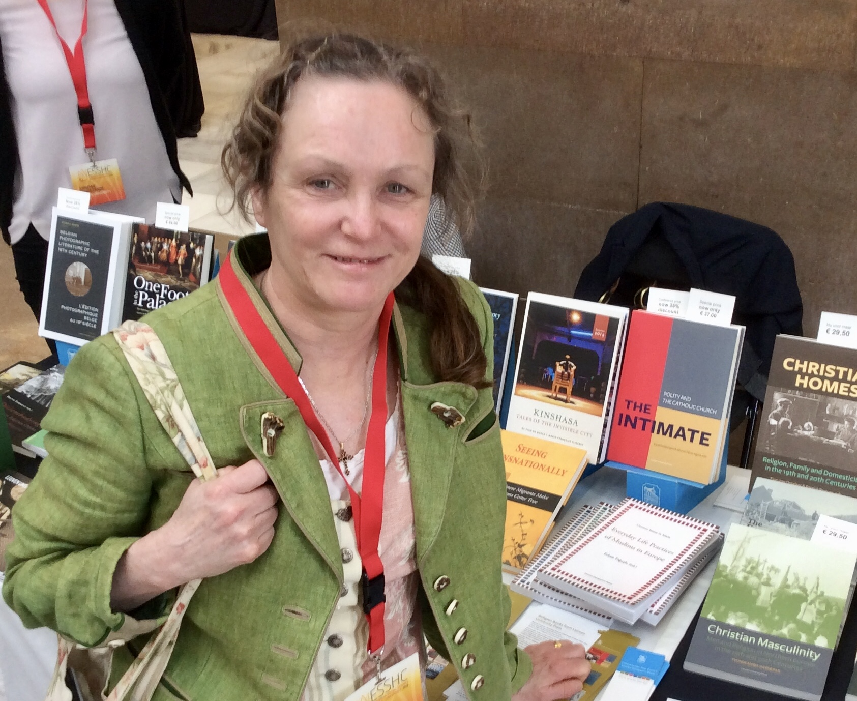 Yvonne Maria Werner på historikerkonferens i Valencia 31 mars 2016